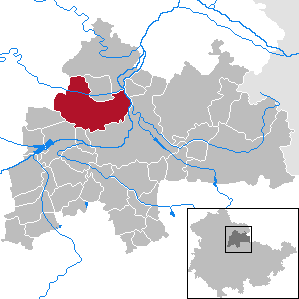 Weißensee in Thuringia - District Sömmerda